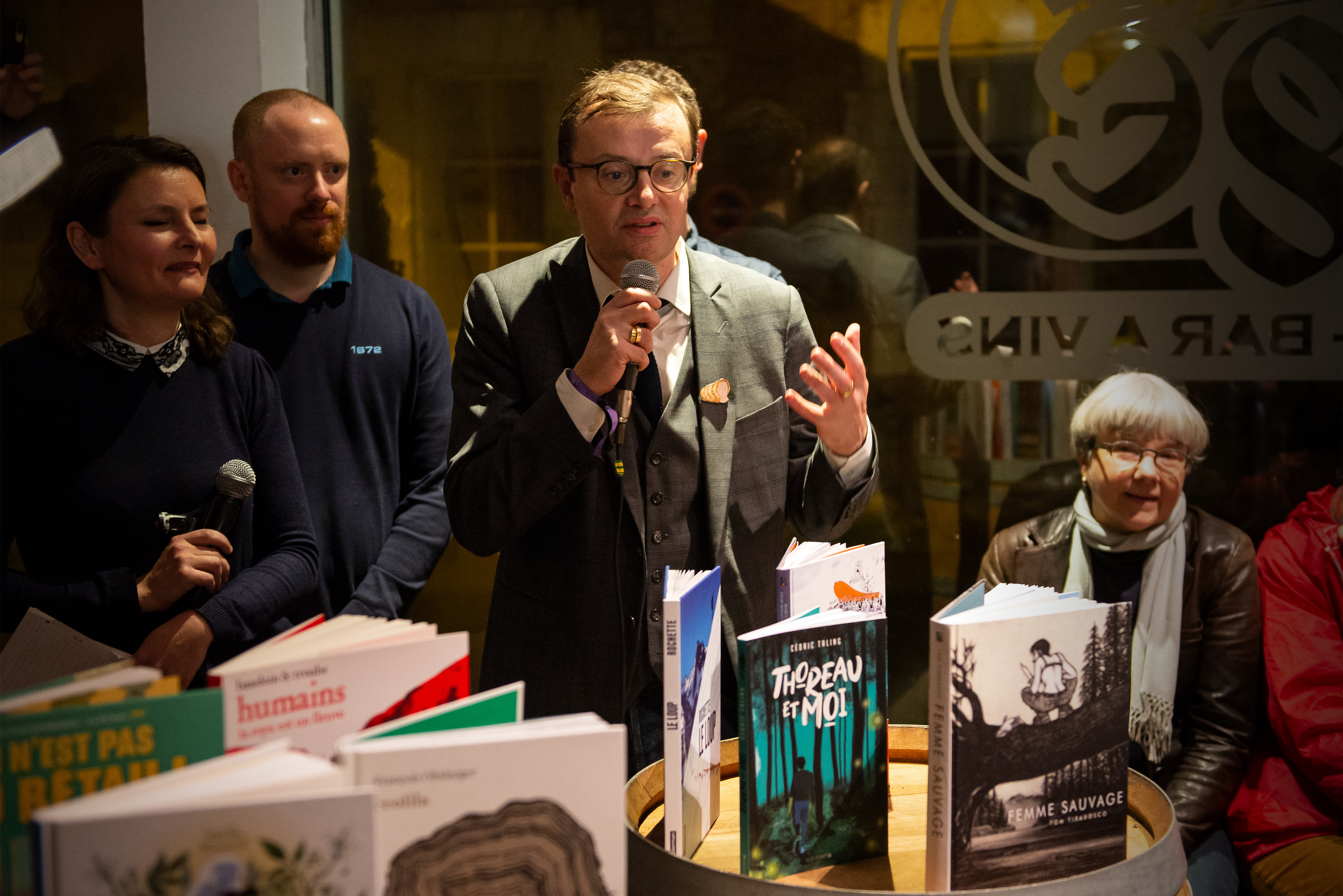 Sébastien Gnaedig, éditeur de l'album récompensé, Femme sauvage de Tom Tirabosco, prix Tournesol au Festival International de la Bande Dessinée d'Angoulême 2020.